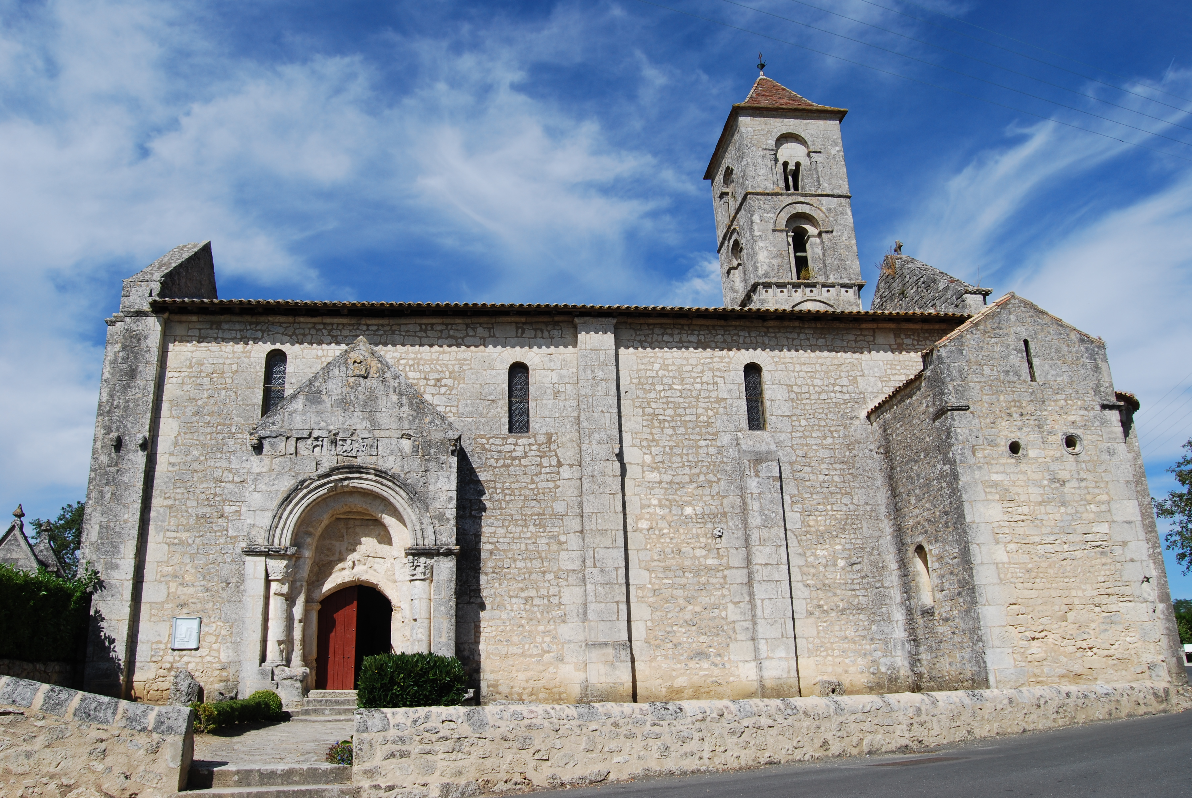 Église Saint-Georges de Montagne, (Classé, 1920) .